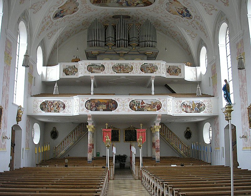 Pfarrkirche St. Nikolaus (Bernbeuren, Landkreis Weilheim-Schongau, Oberbayern). Innenraum nach Westen. Eigene Aufnahme, Feb. 2007 / Parish church St. Nikolaus (Bernbeuren, Upper Bavaria, Germany). Interior, looking west. Own photo, Feb. 2007